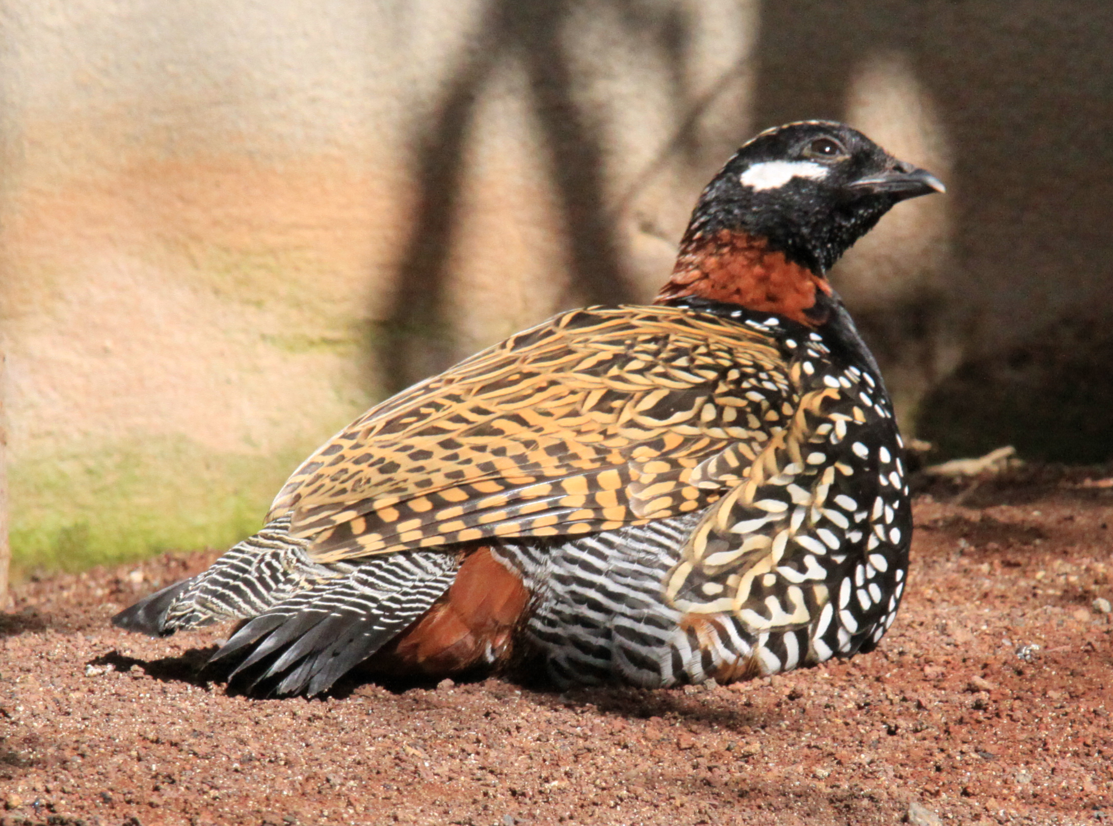 Francolinus francolinus